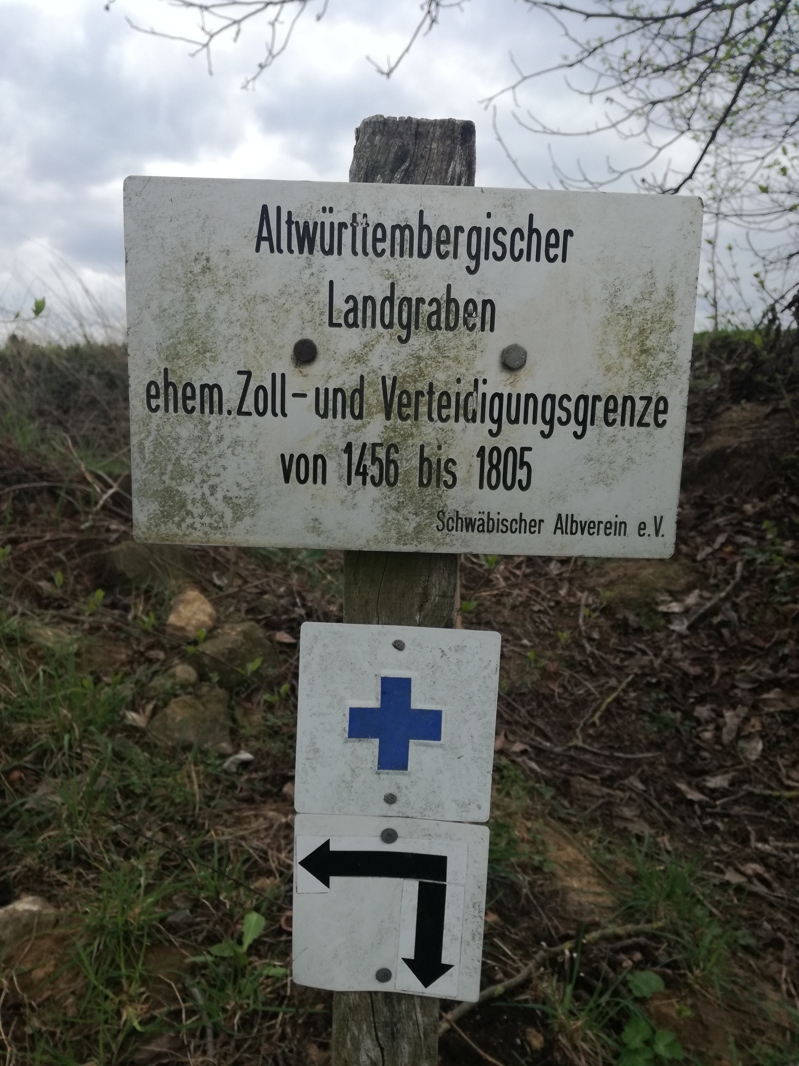 Hinweis des Schwäbischen Albvereins auf historische Grenzanlage bei Abstatt (Baden-Württemberg)